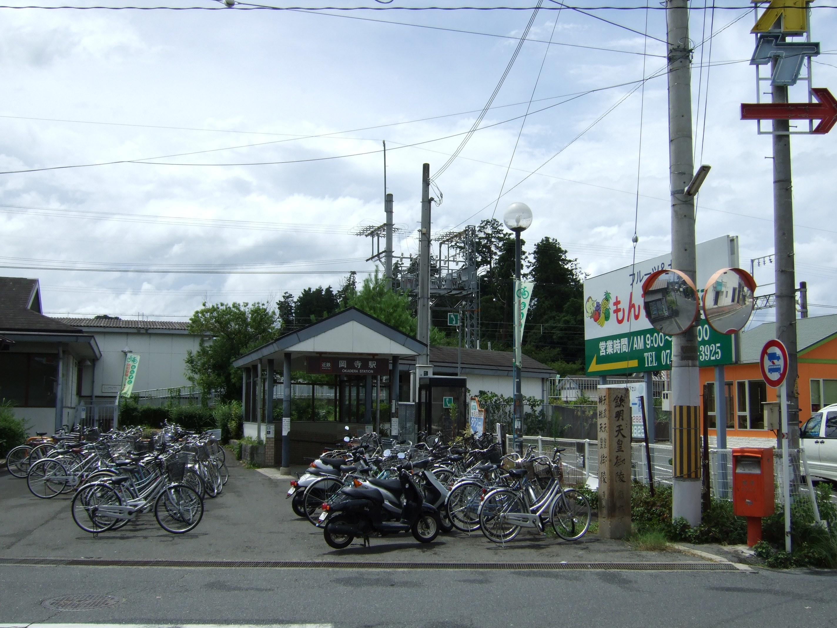 橿原市岡寺駅。